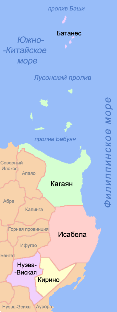 Карта провинций Долины Кагаян